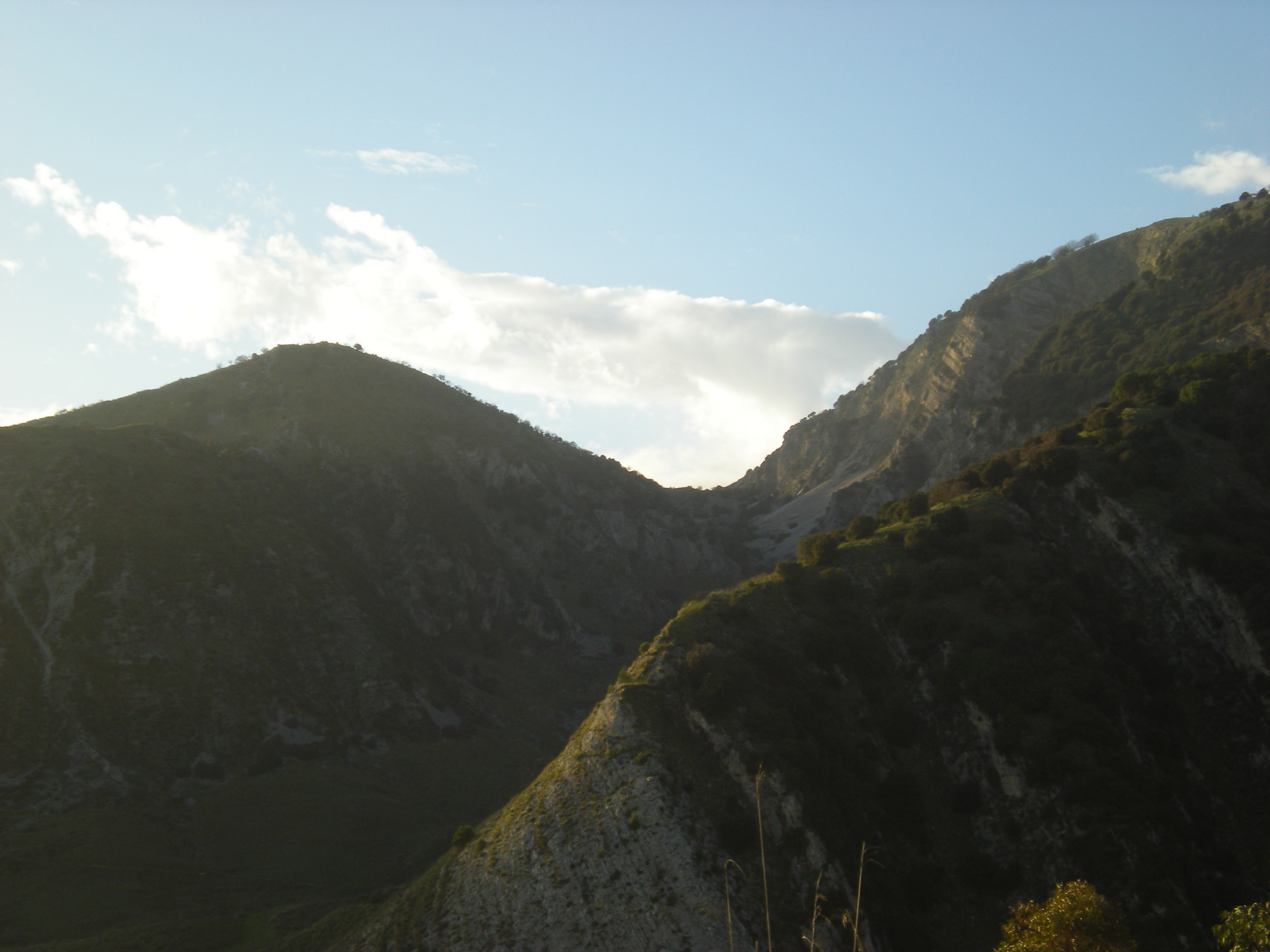 Riserva Naturale